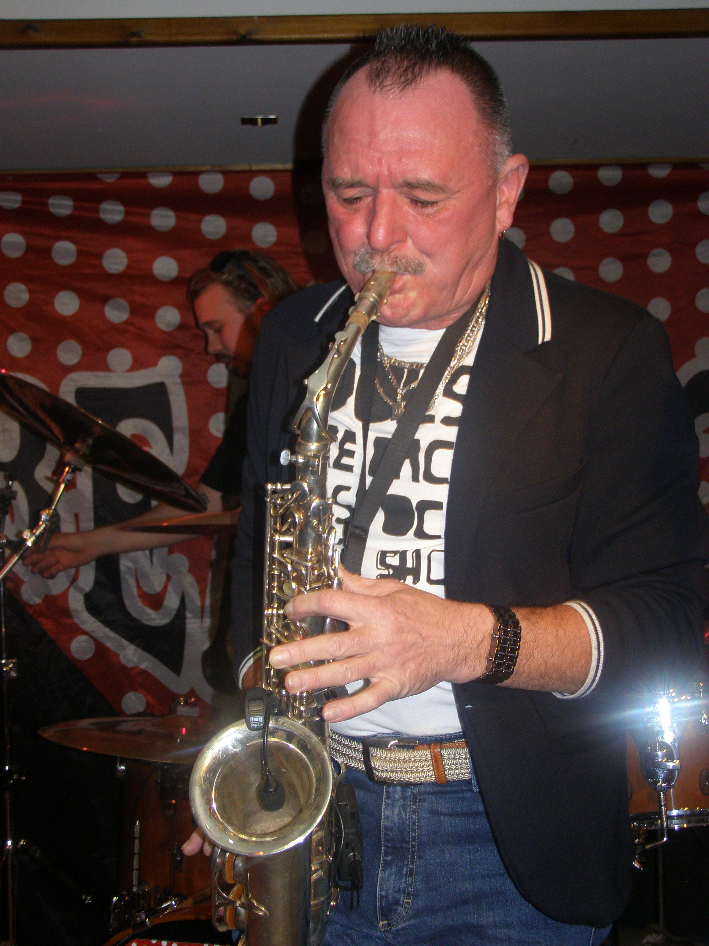 Nagy Feró a Petőfi Csarnokban. Petőfi Csarnok Caffé Beatrice klub.